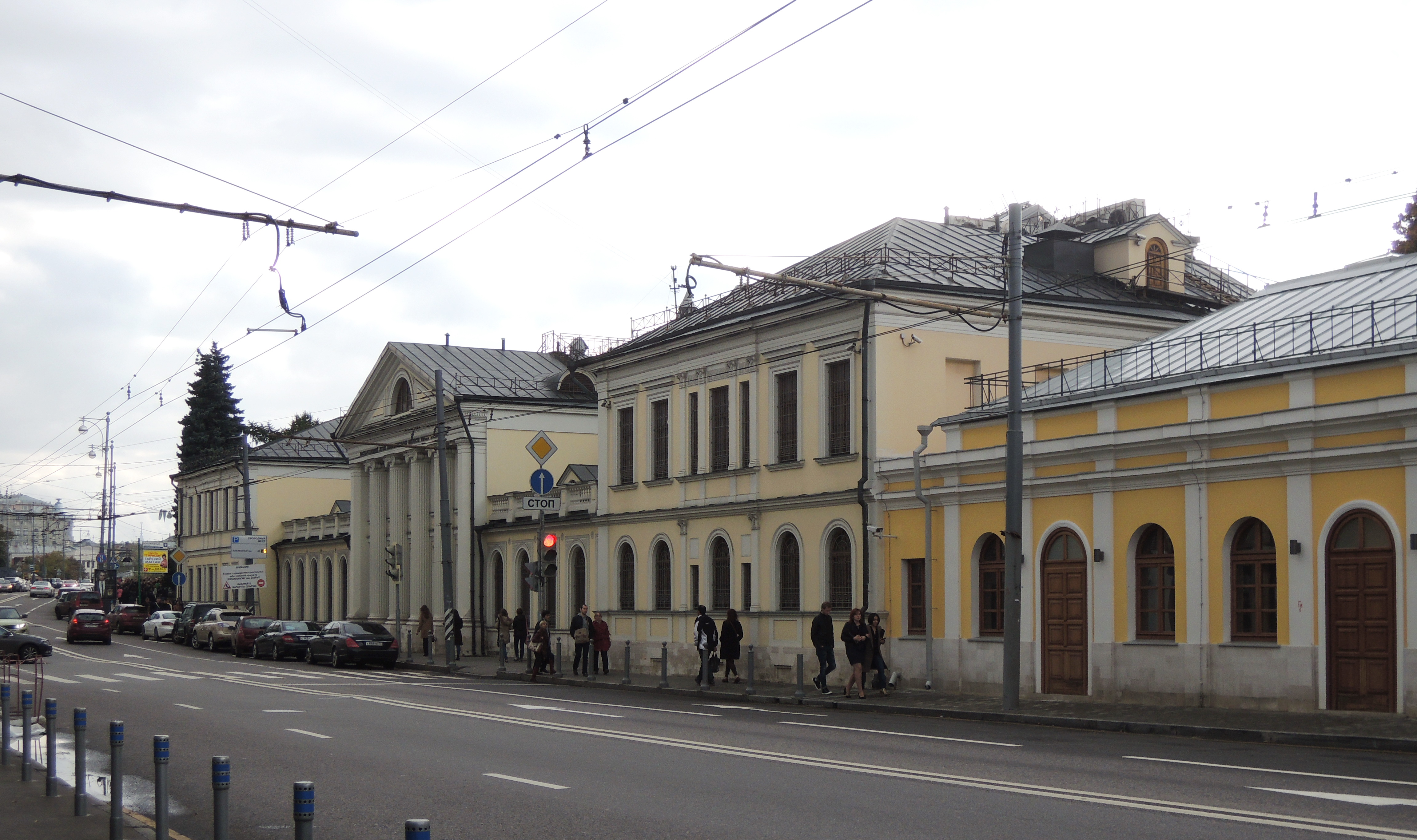 Волхонка